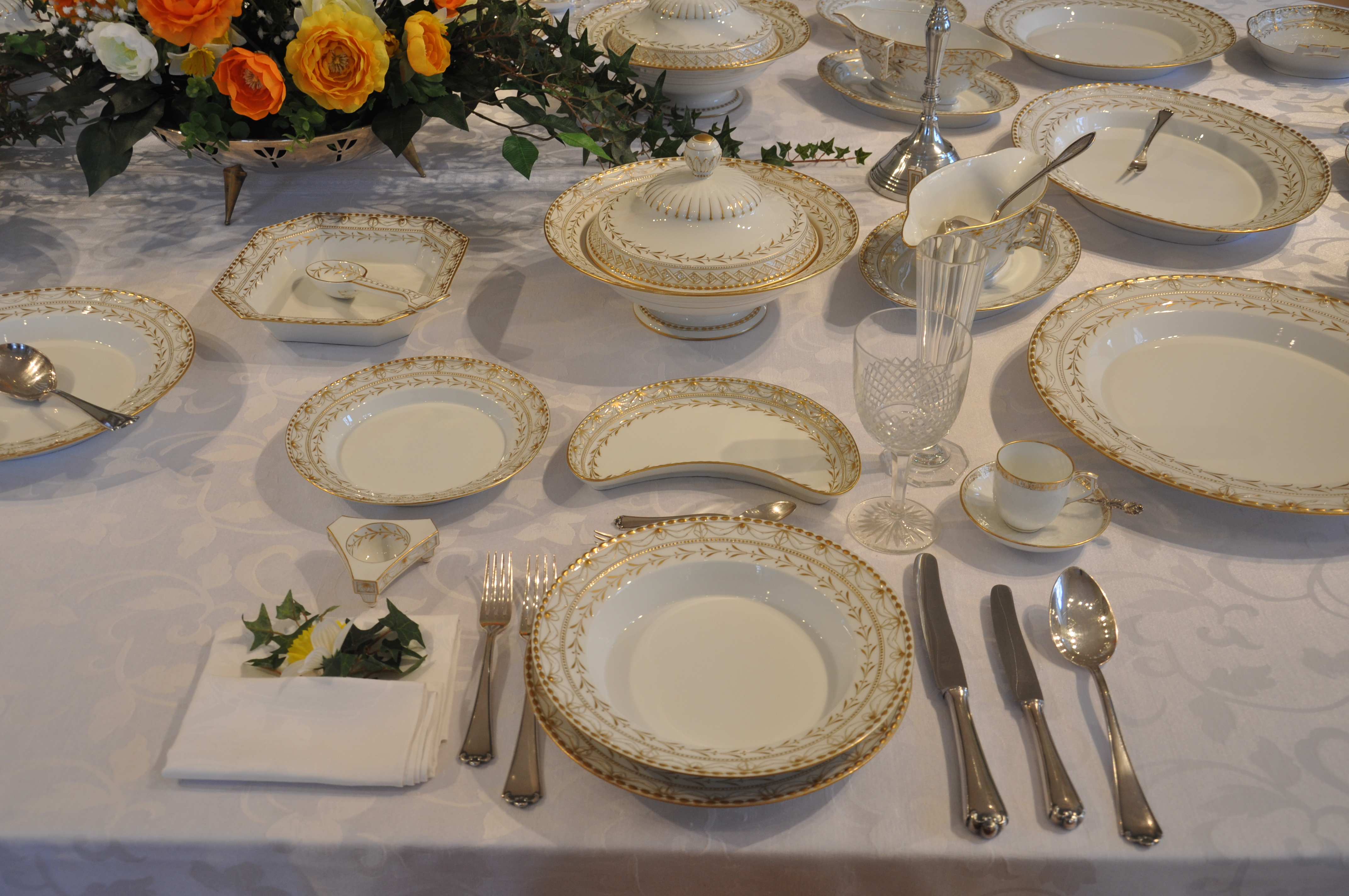 Museum Senftenberg (im Schloss Senftenberg) Festlich gedeckter Tisch